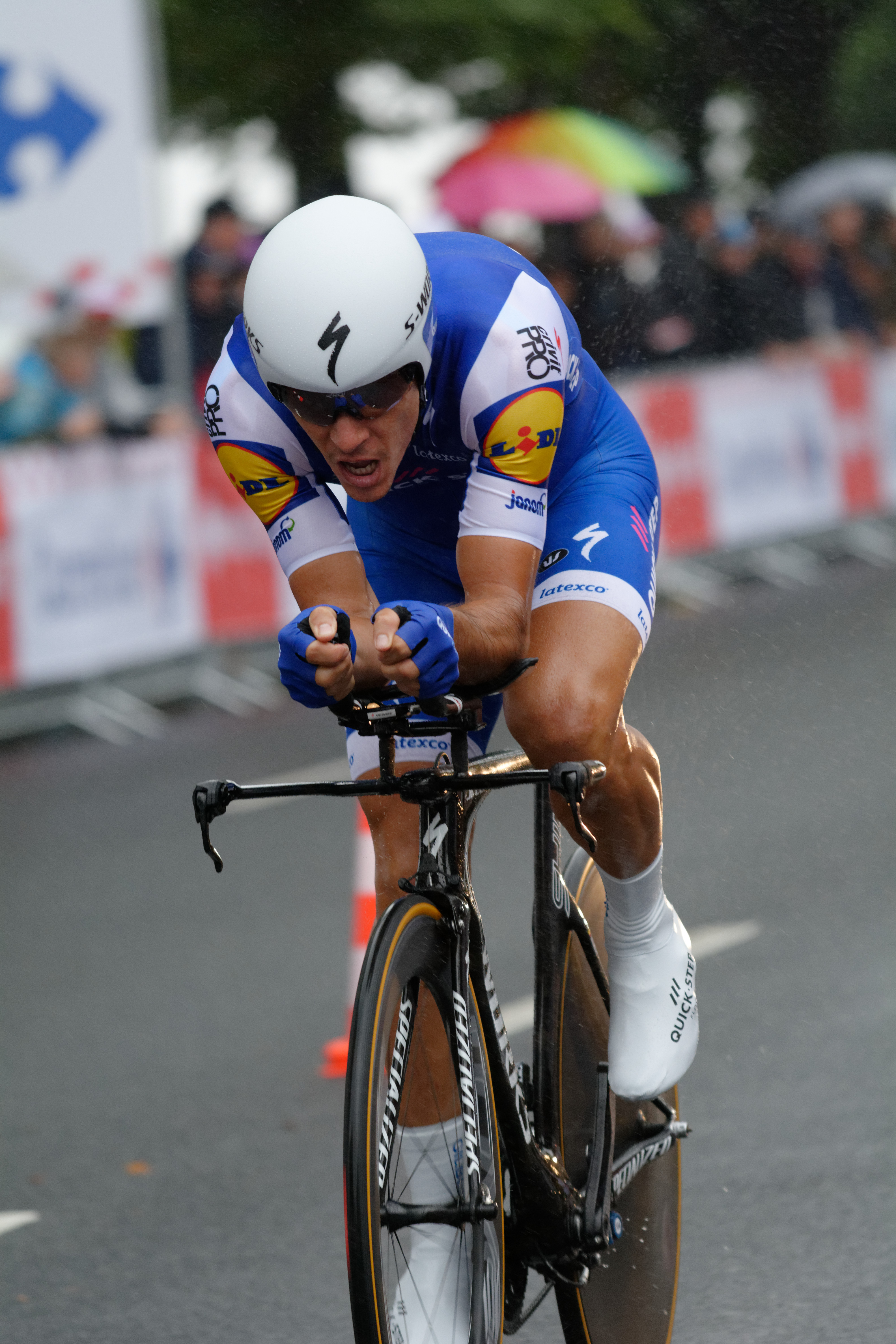 Tour de France 2017 Stage 1 Düsseldorf